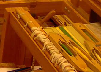 Framknytning med käpp, skyttel och vävspännare